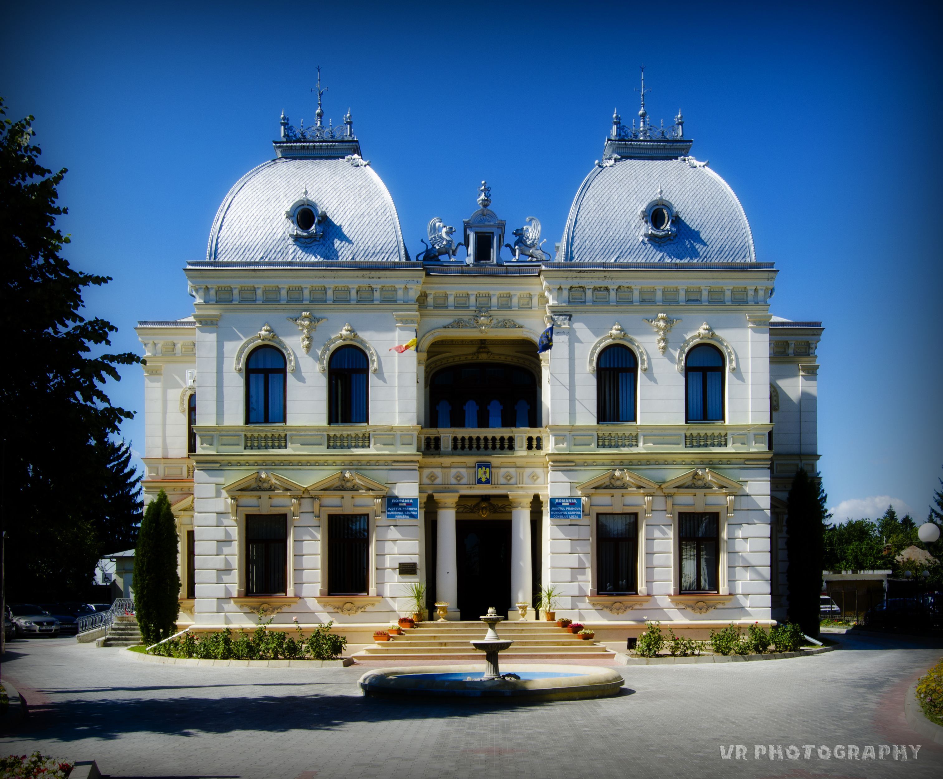 Cladirea actualului sediu al Primariei Câmpina, cunoscuta sub denumirea de "Casa cu Grifoni", a fost construita în anii 1901-1902 de Gheorghe Stefanescu, originar din Câmpina. Cladirea, construita pentru familia sa, a fost prima iluminata electric din Câmpina, având la subsol un grup electrogen adus din Germania.